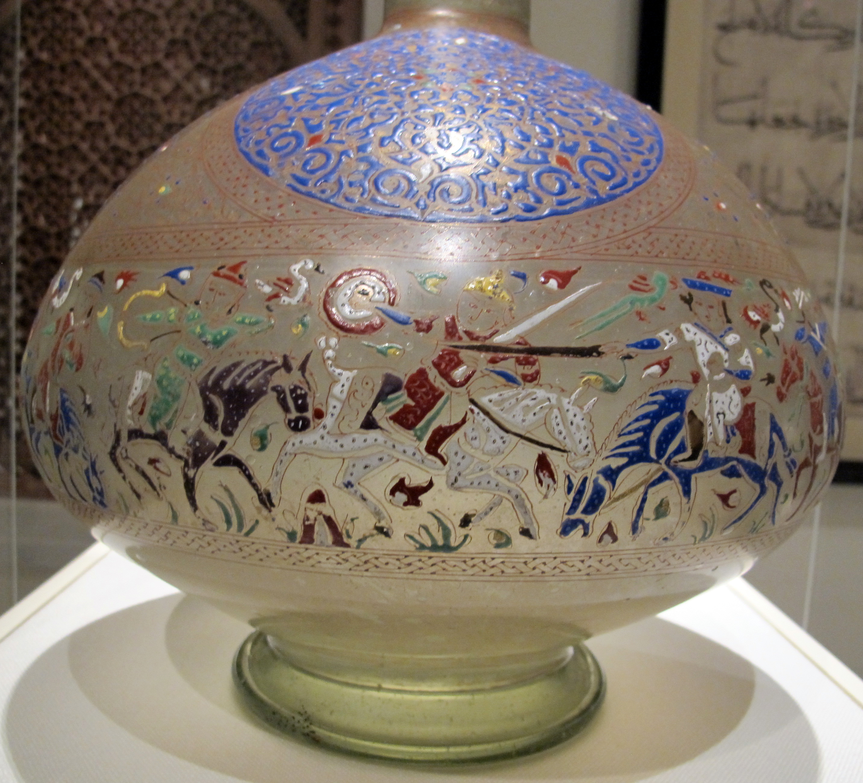 Collezione del Metropolitan Museum, NYC